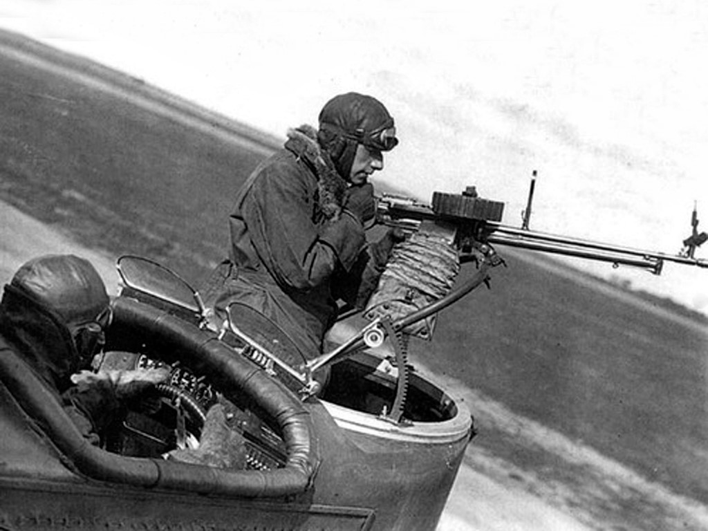 Handley Page